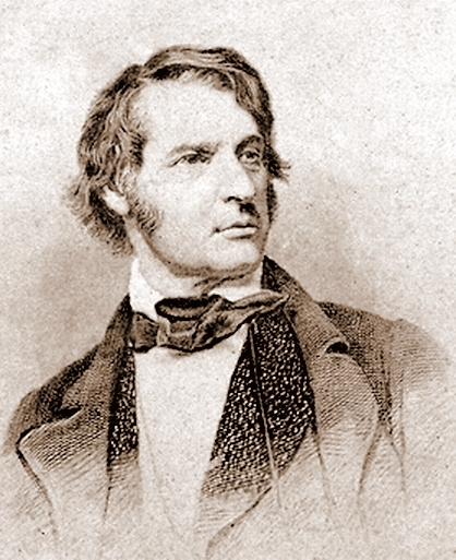 Charles Sumner. Steel engraving